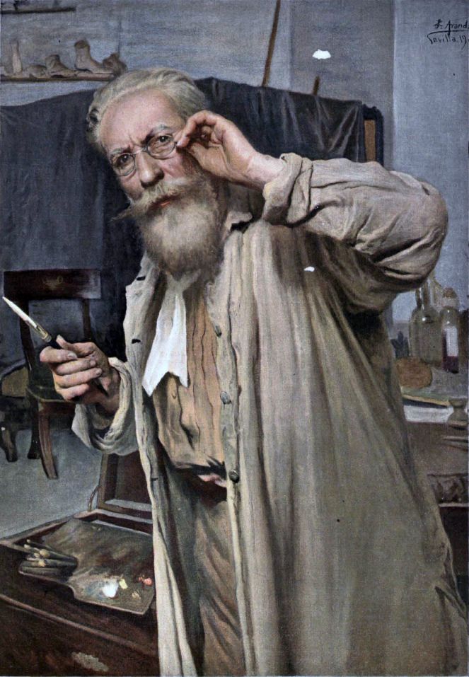 Retrato de Jiménez Aranda, pintado por el mismo, recogido en la revista española Álbum Salón.